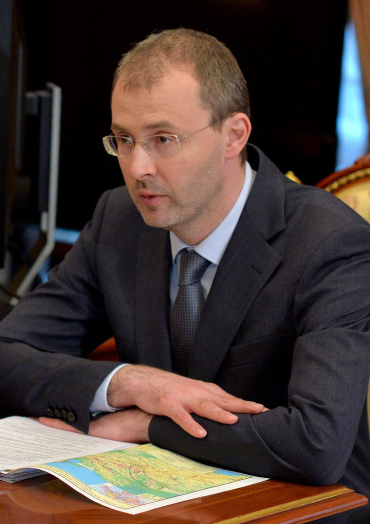 Губернатор Чукотского автономного округа Роман Копин во время рабочей встречи с президентом России Владимиром Путиным